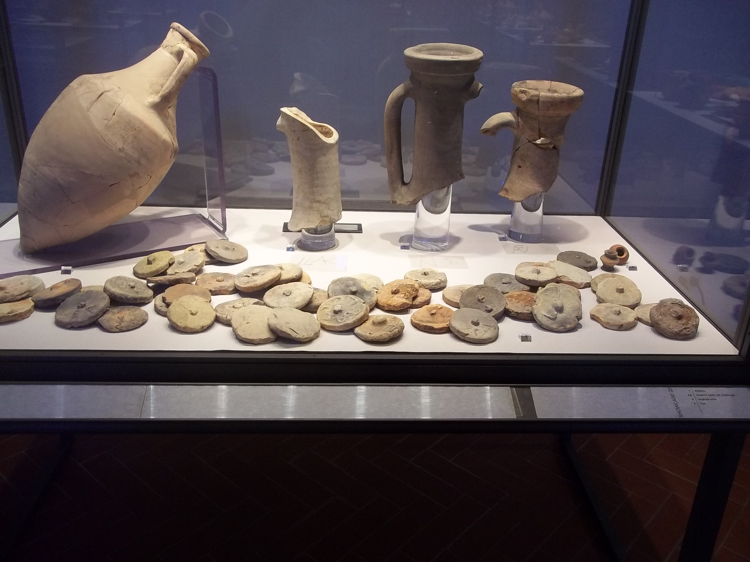 המוזיאון של הספינה הרומית